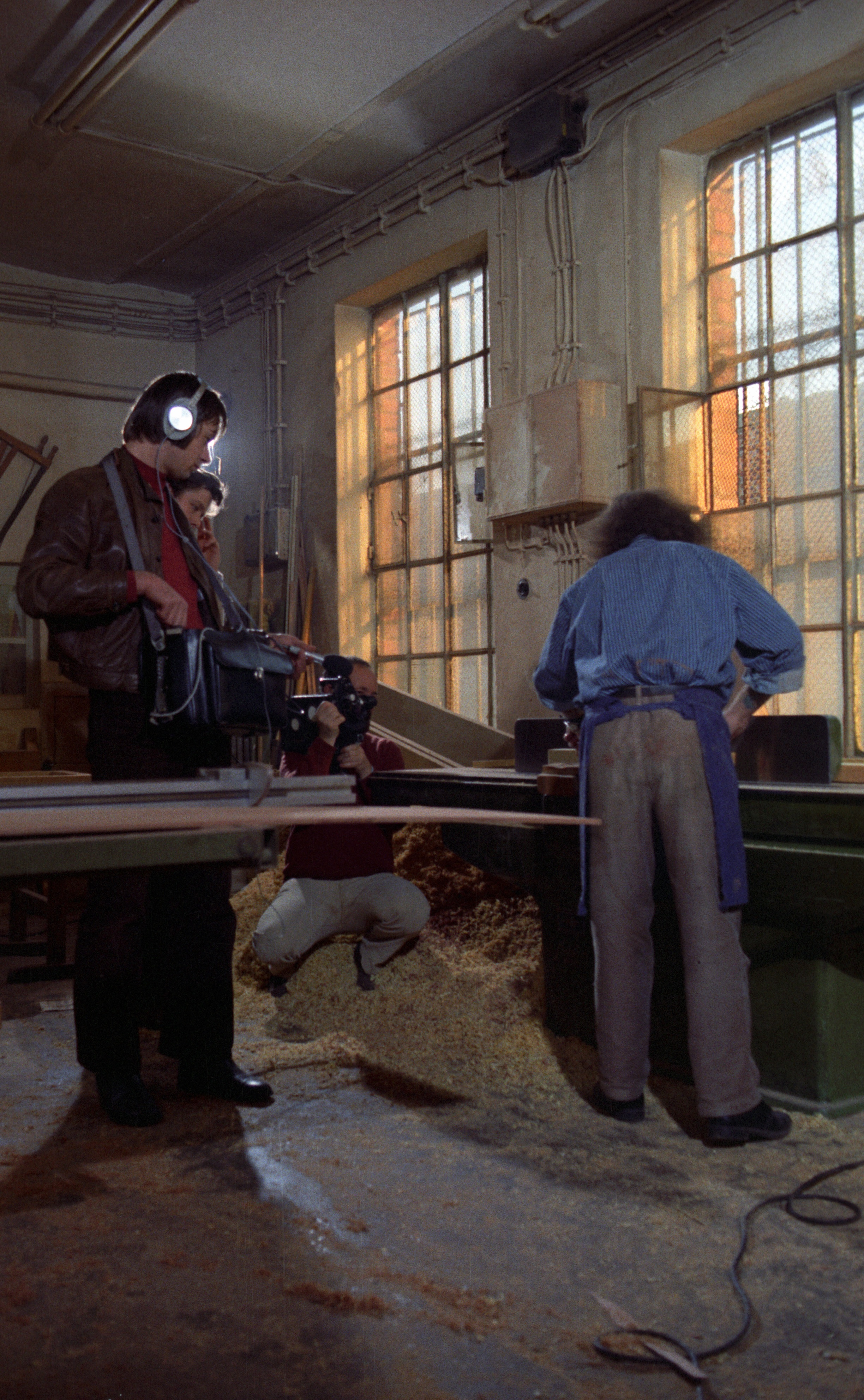 Dreharbeiten in der Tischlerei der JVA Fuhlsbüttel in den Siebzigerjahren für das NDR-Regionalprogramm in Hamburg. Links Tontechniker Peter Techen